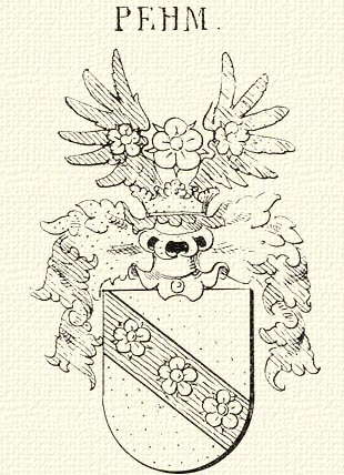 Nemes Pehm család címere. Mindszenty József (1892-1975) hercegprímás családja címere.